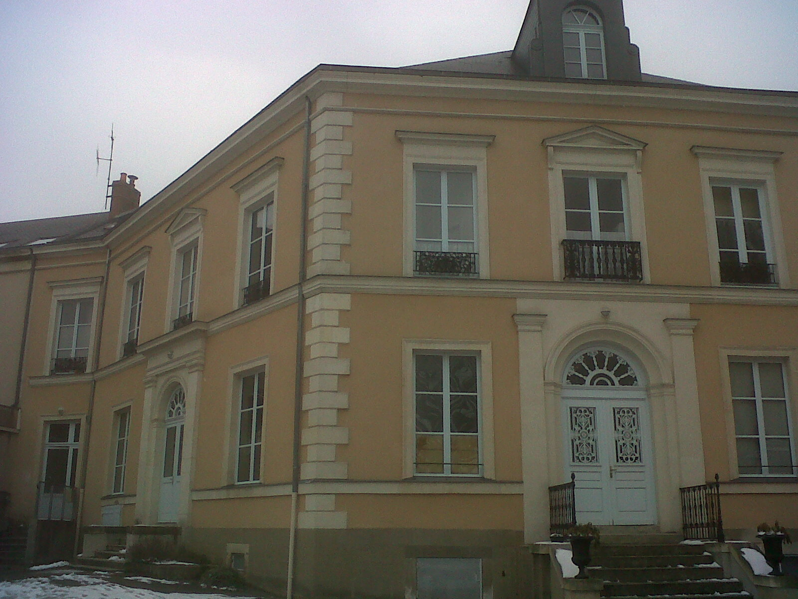 Le Petit Pavillon, servant de Logement de Fonction et de salles de cours.